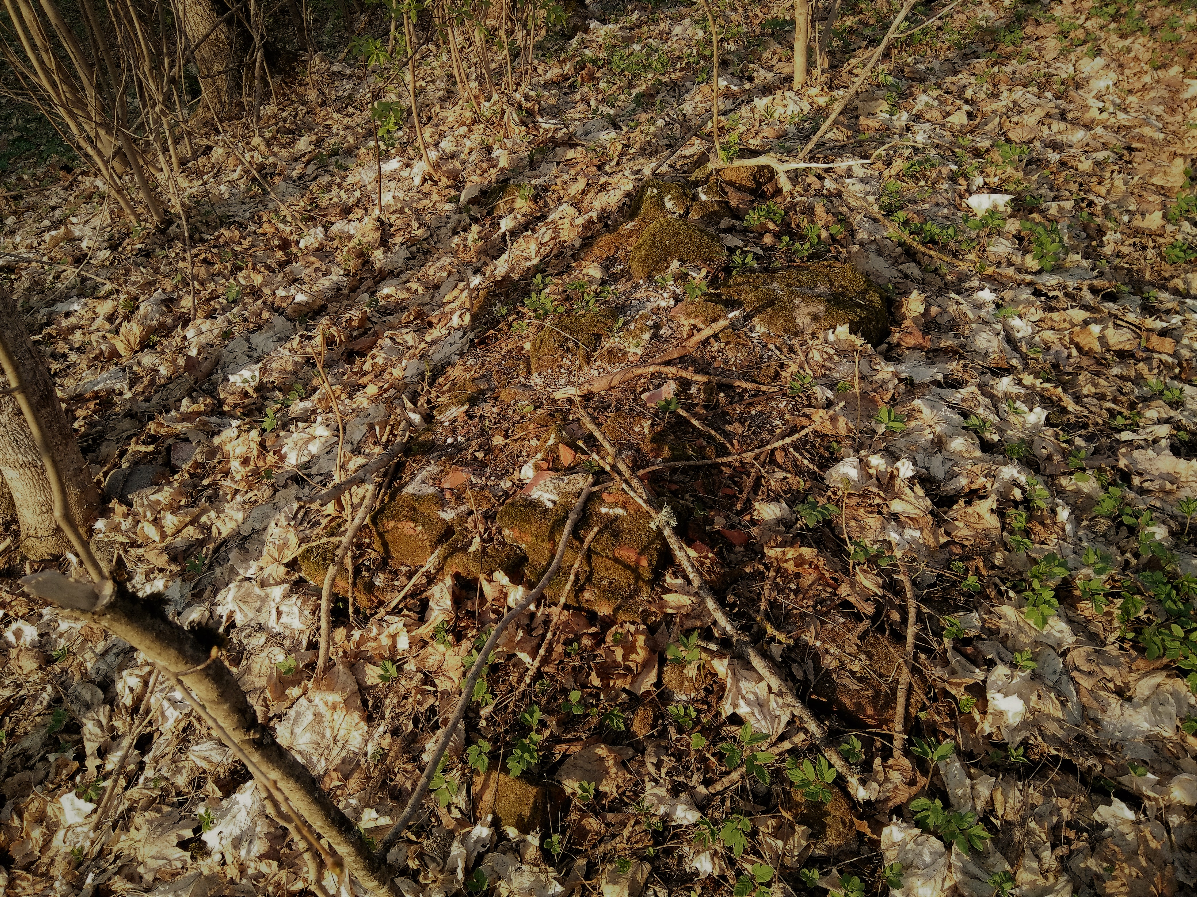 Vaade kunagise torn- või majalinnuse asukohas maapinnal paljastuvatele vundamendimüüridele.